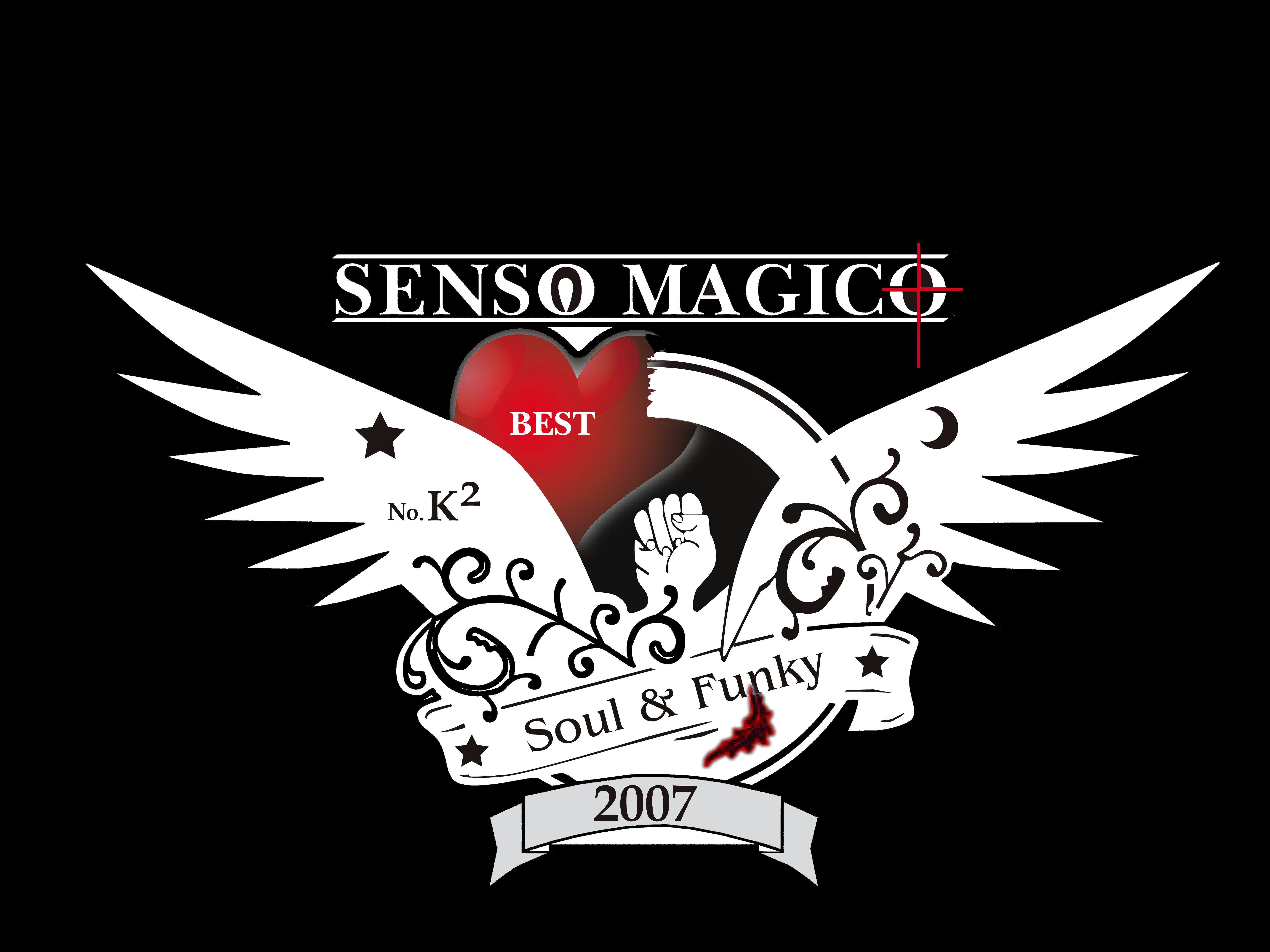 A Senso Magico zenekar hivatalos címere